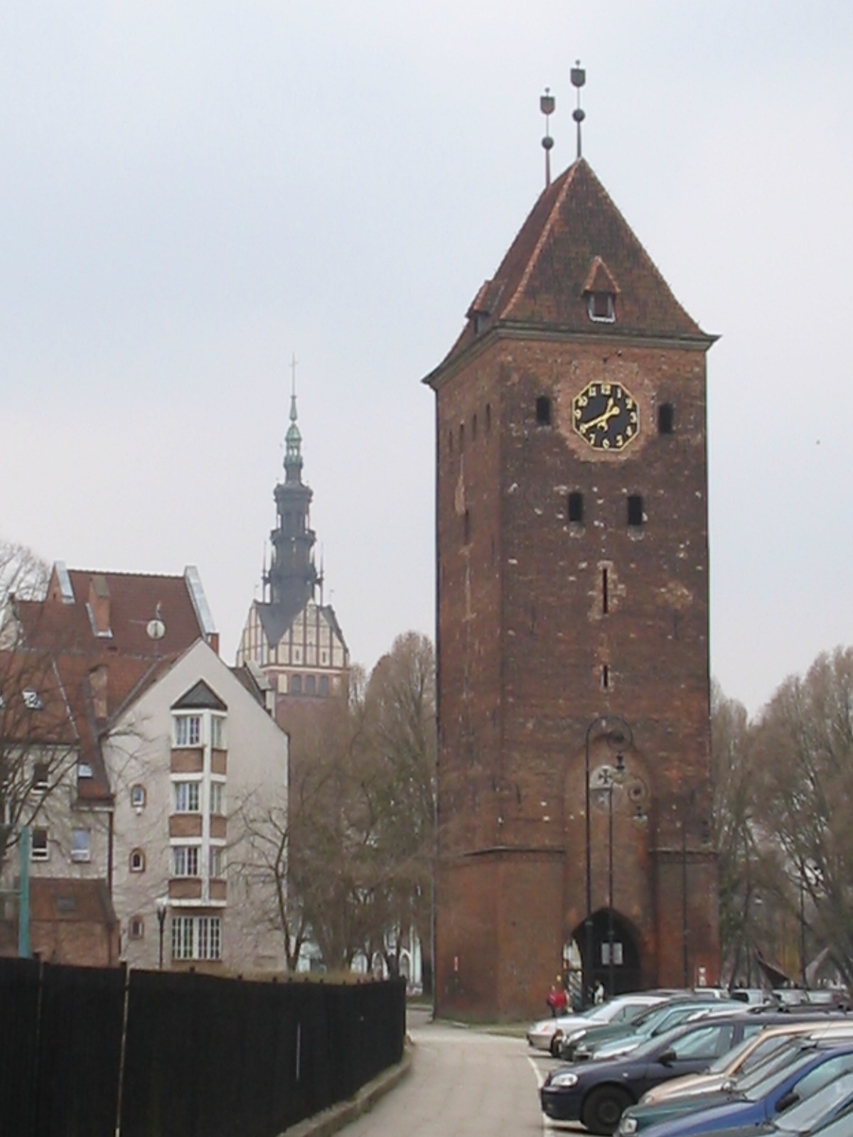 Poort in Elblag, 2005, Wieża zegarowa